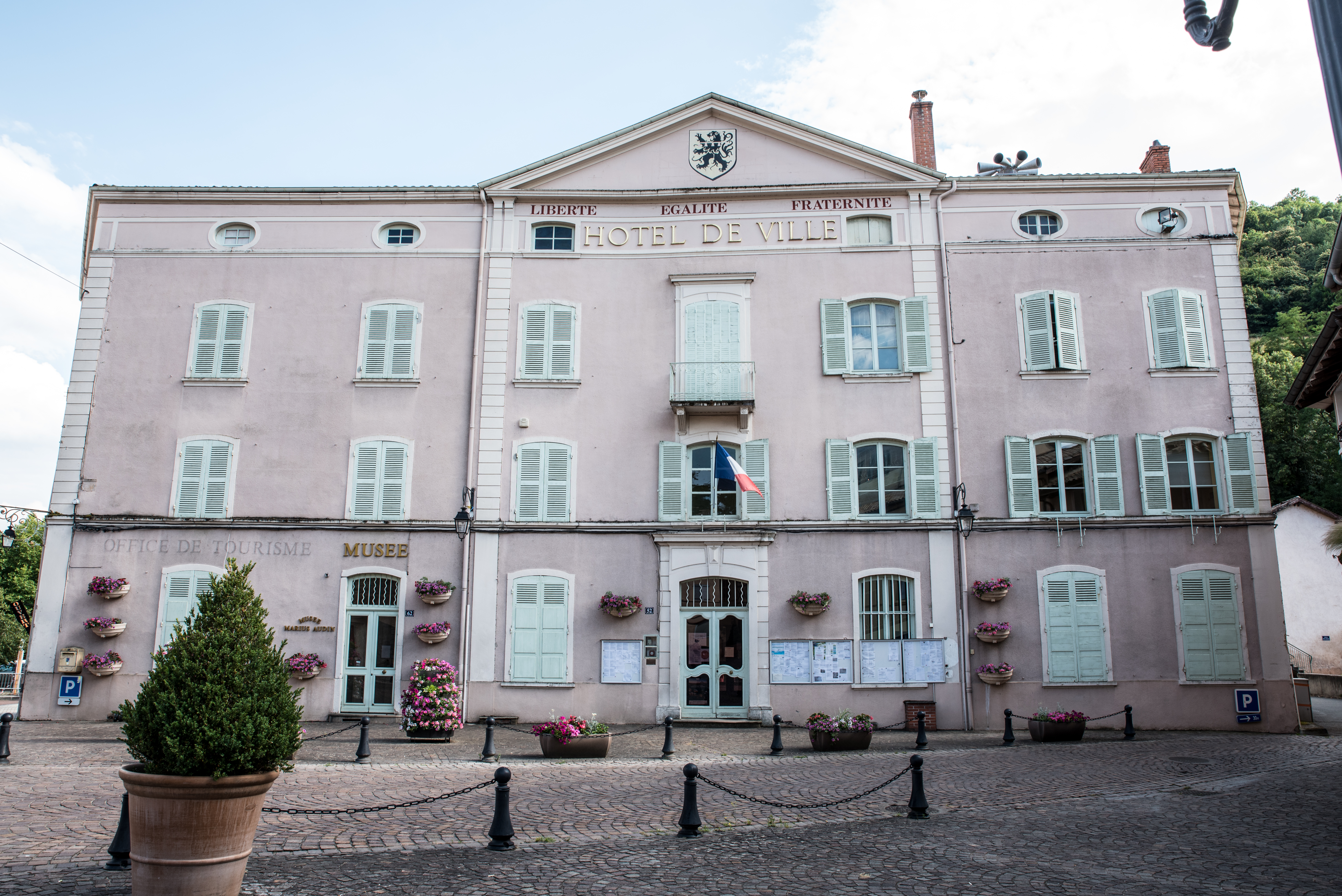 Mairie de Beaujeu